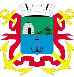 Герб Бердянска